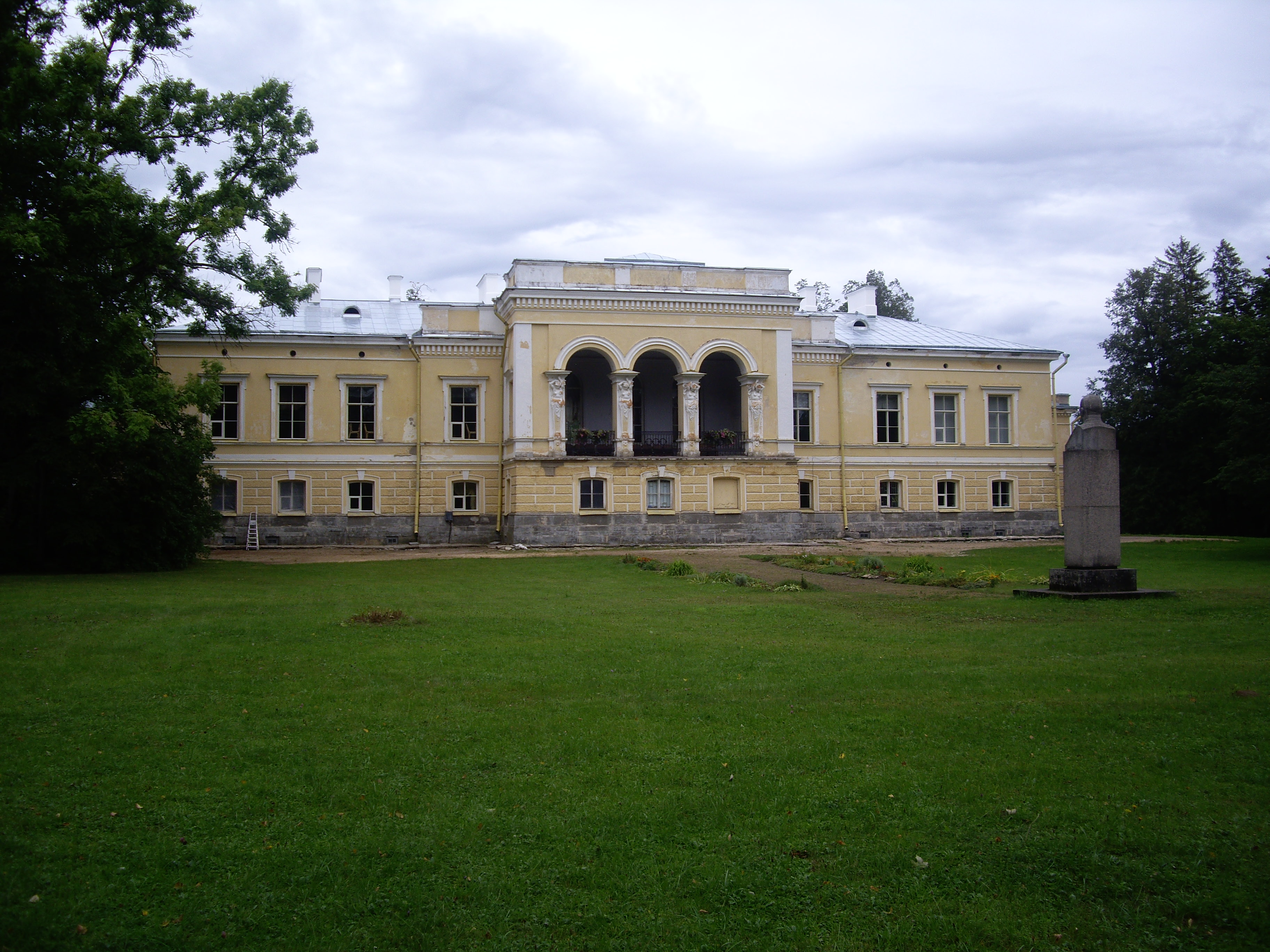 Muuga mõis